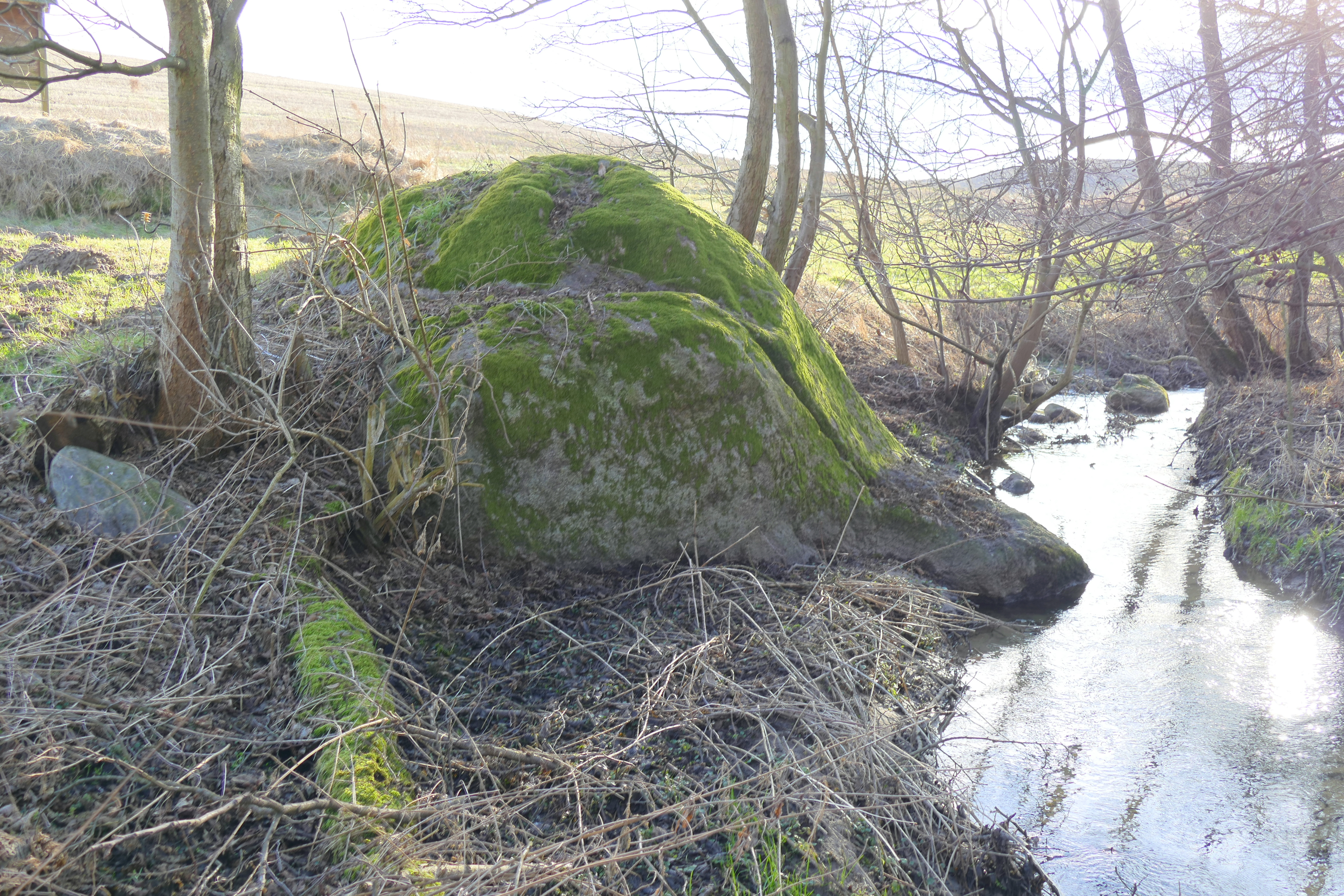 Schusterstein bei Rosemarsow, Nordostseite am Marienbach